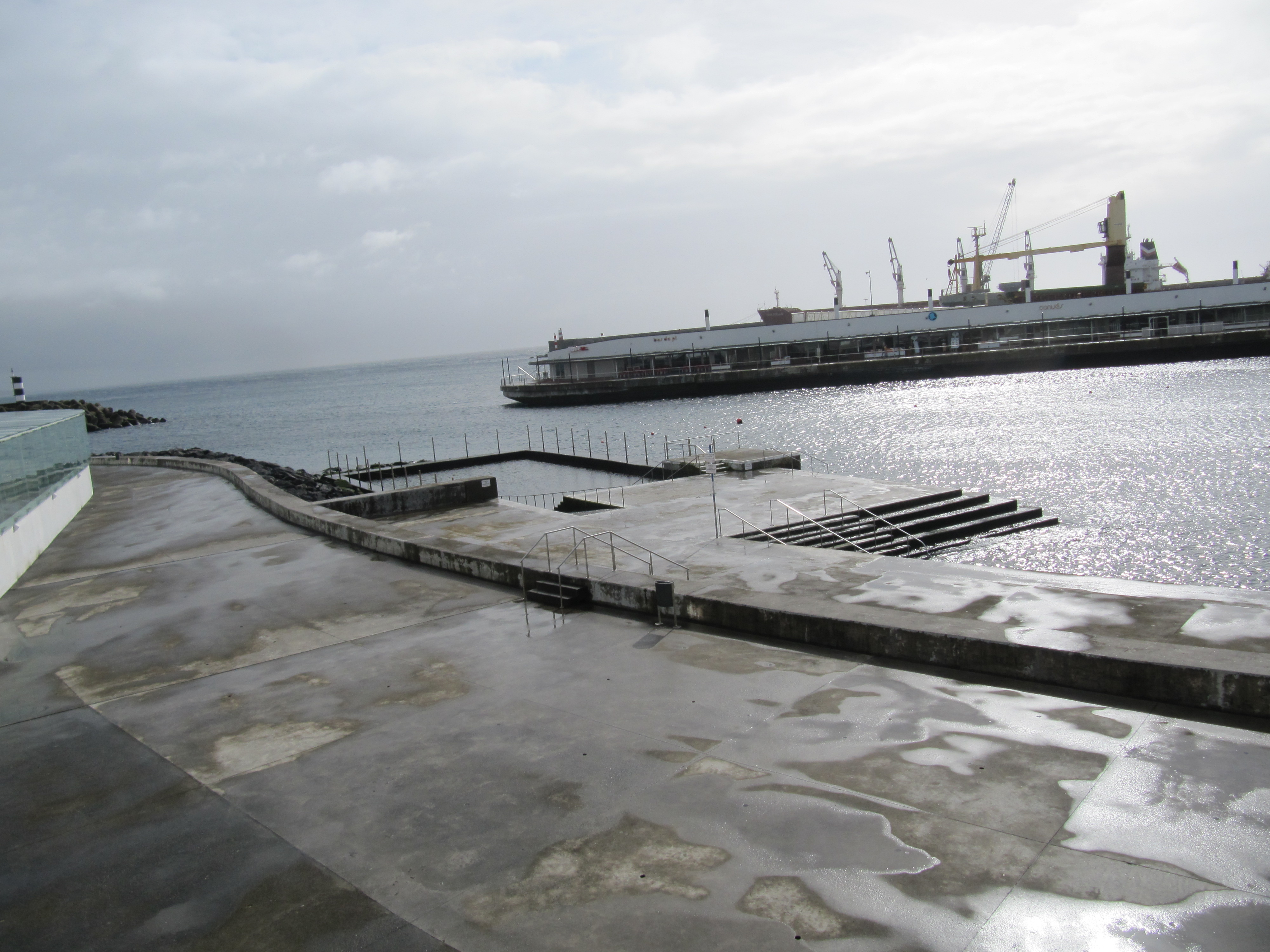 öffentliches Schwimmbad